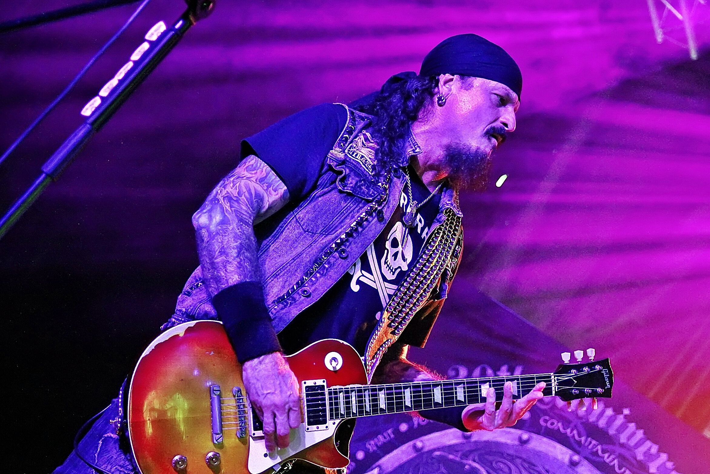 Jon Schaffer - Pyras/Deutschland 2018